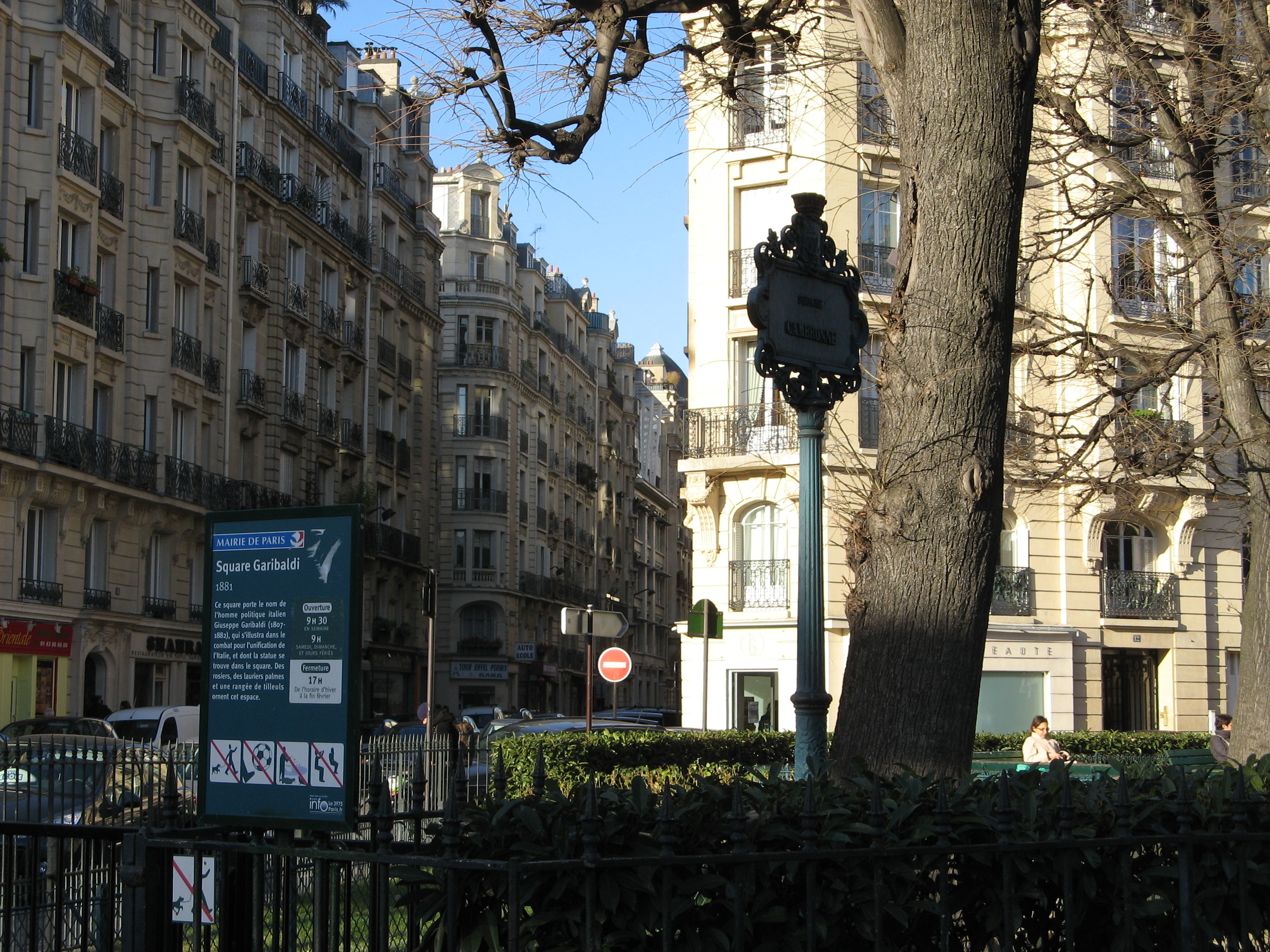 Square Garbaldi, Paris 15e, France